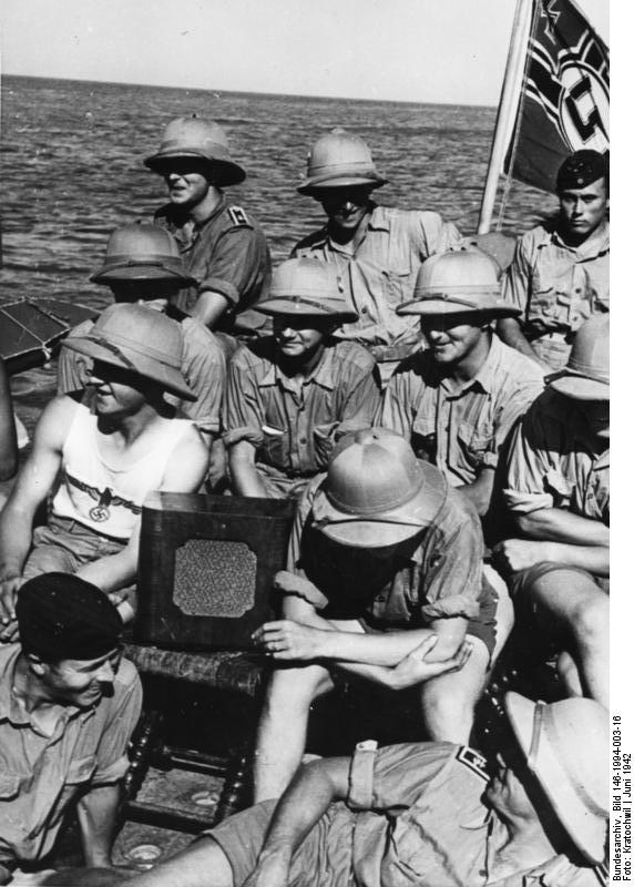 "Hallo Kameraden in Afrika!" Selbst die Matrosen auf See gehören mit zu der grossen Hörgemeinde. 26.6.42 PK-Aufnahme-Kriegsberichter: Kratochwill